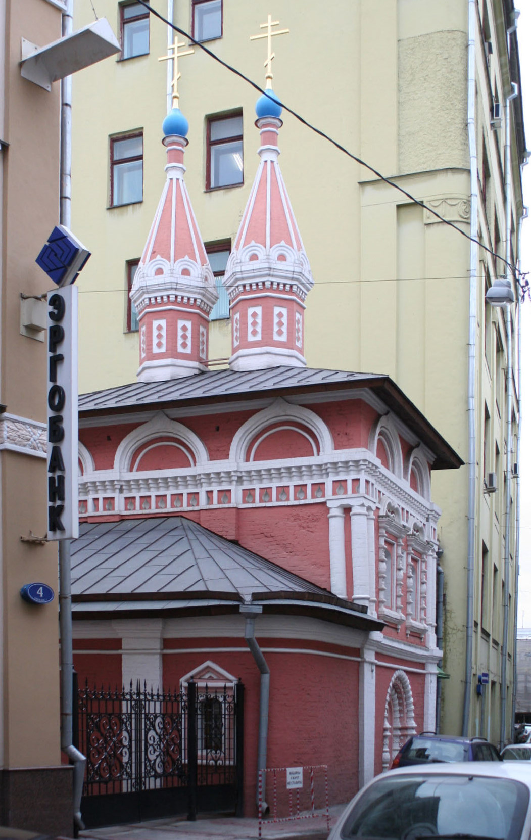 Церковь Космы и Дамиана в Старых Панех в Старопанском переулке Китай-города. 1640 год. Реставрация 2004-2007 гг.